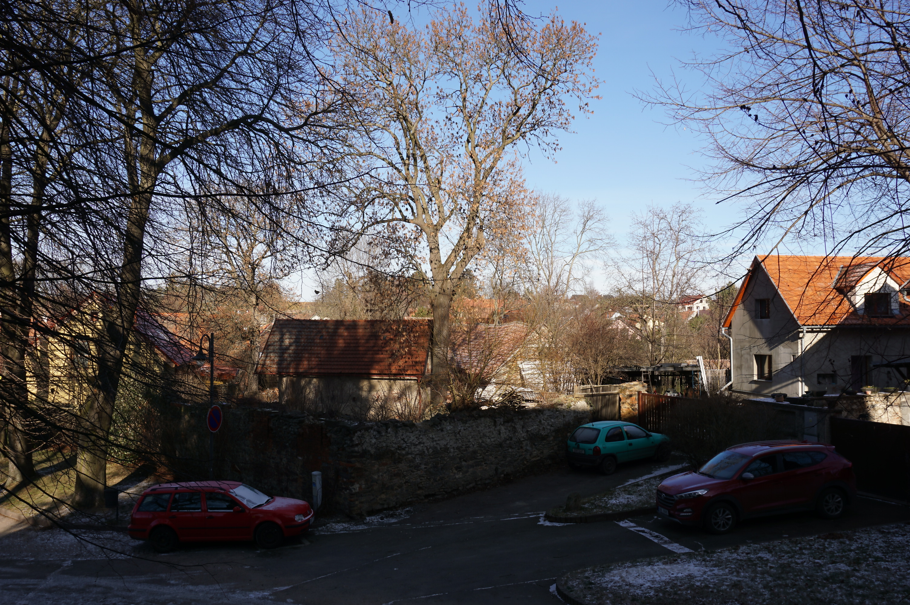 Hrad Tehov, Tehov, Tehov (okres Praha-východ).